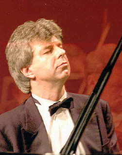 Michel Bourdoncle